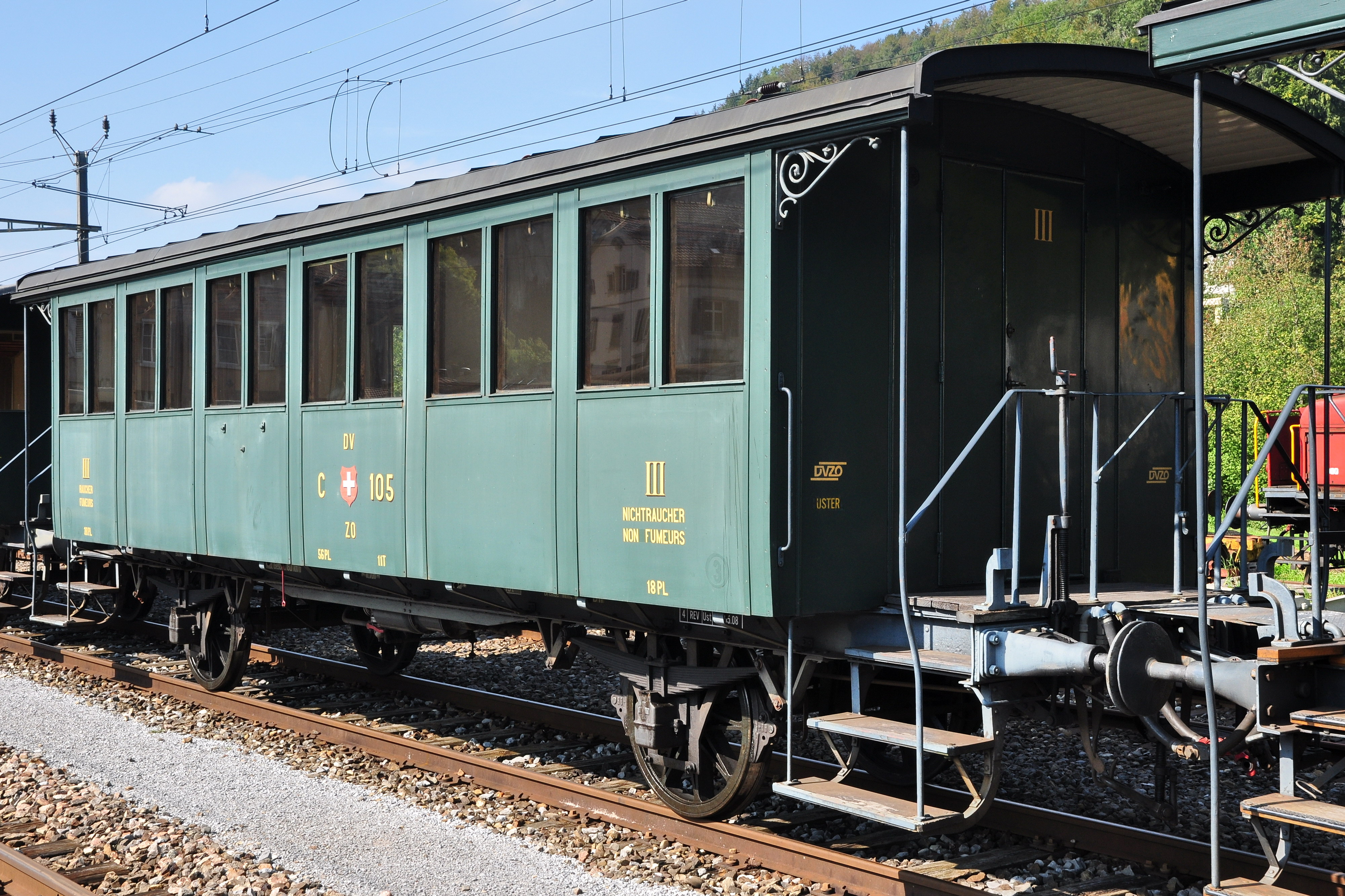 Bahnhof in Bauma (Switzerland)